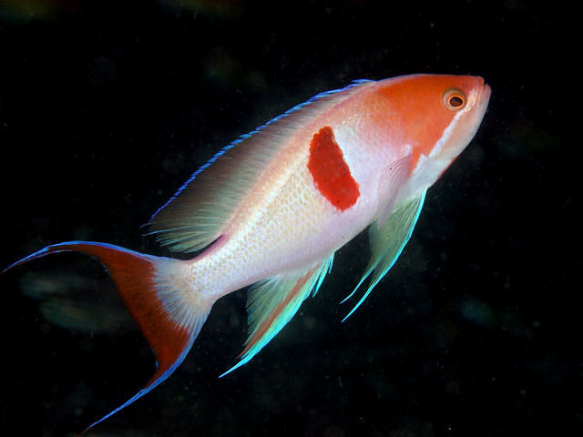 アカオビハナダイ♂ Pseudanthias rubrizonatus